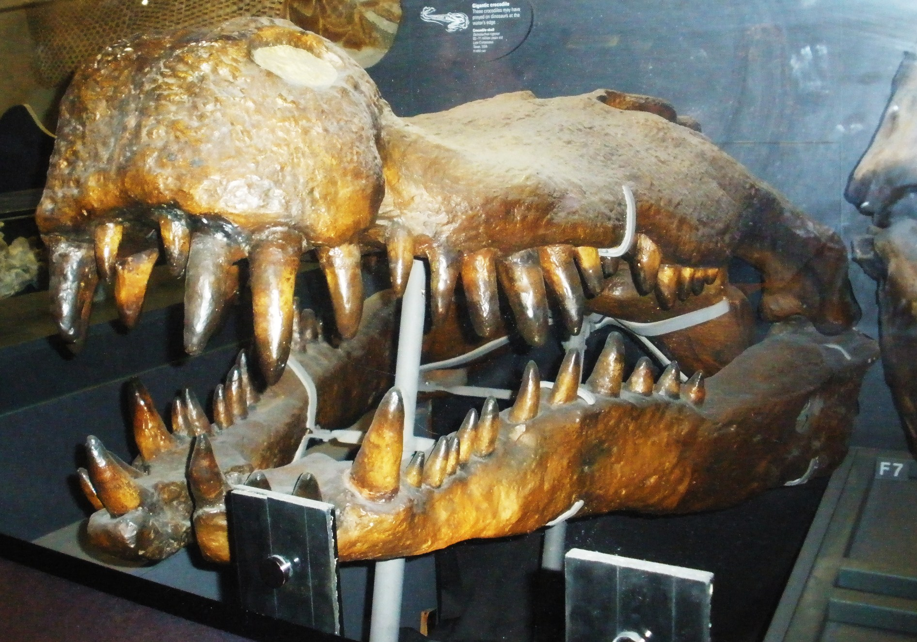 Fossil of Deinosuchus, an extinct reptile-- Took the photo at Natural History Museum, London